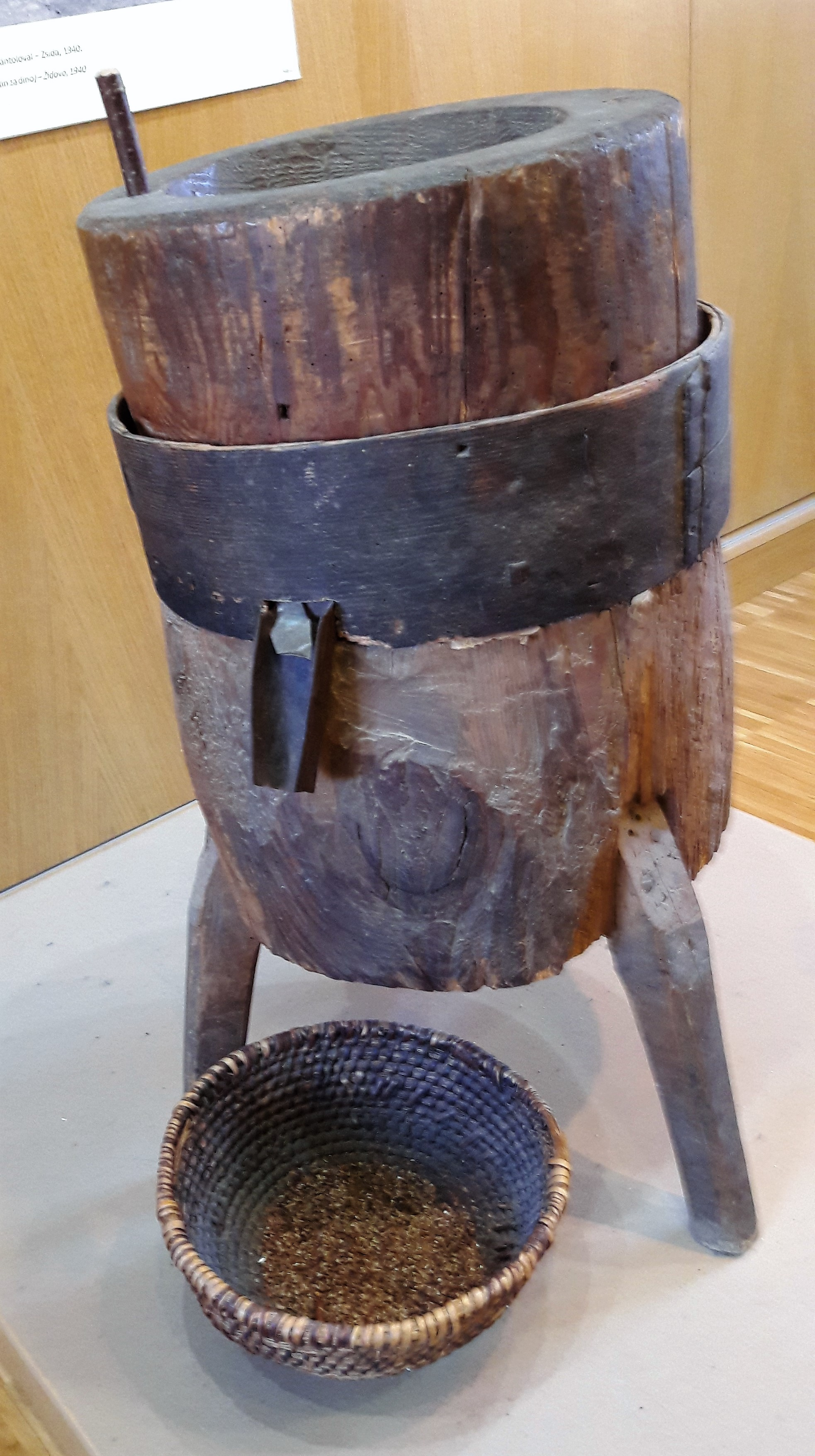 Žrmlje (ročni mlin) za phanje (luščenje) ajdovih zrn. Razstavljeno v Muzeju Avgusta Pavla v Monoštru, 2016.